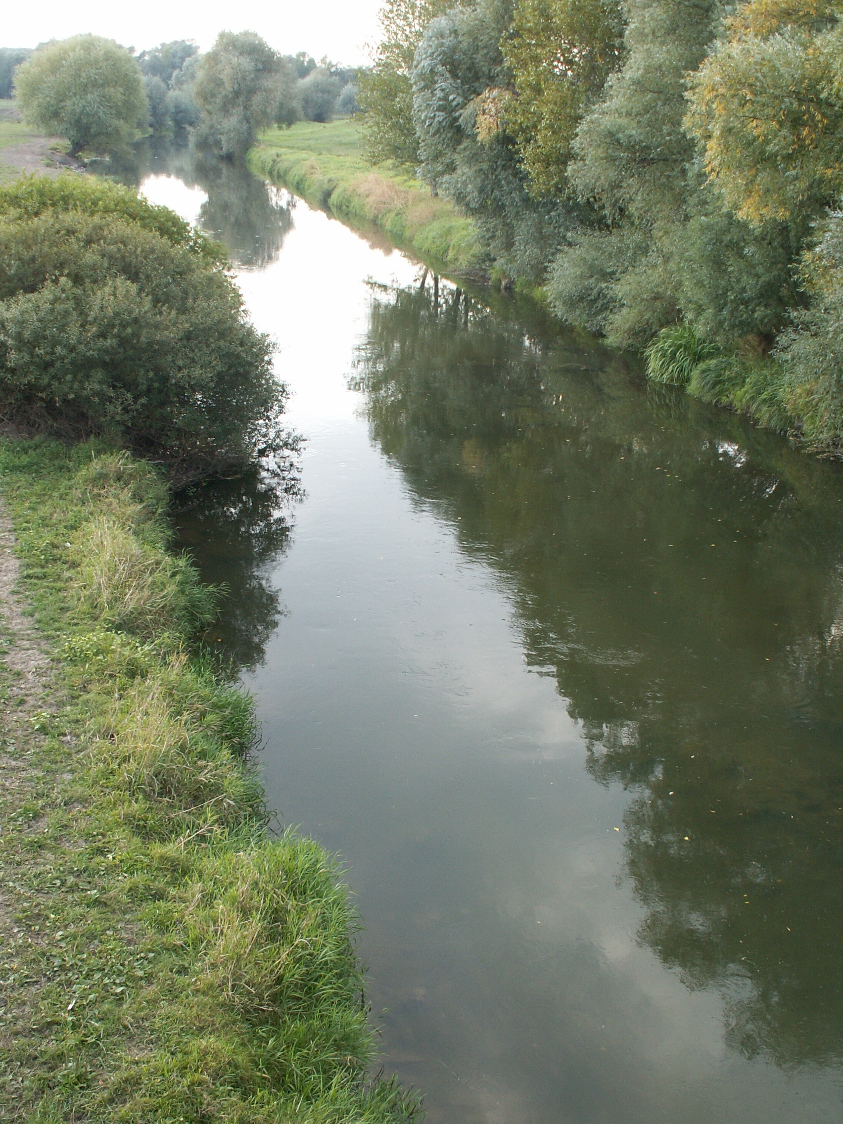 Az Ipoly folyó Ipolyságnál szeptemberben